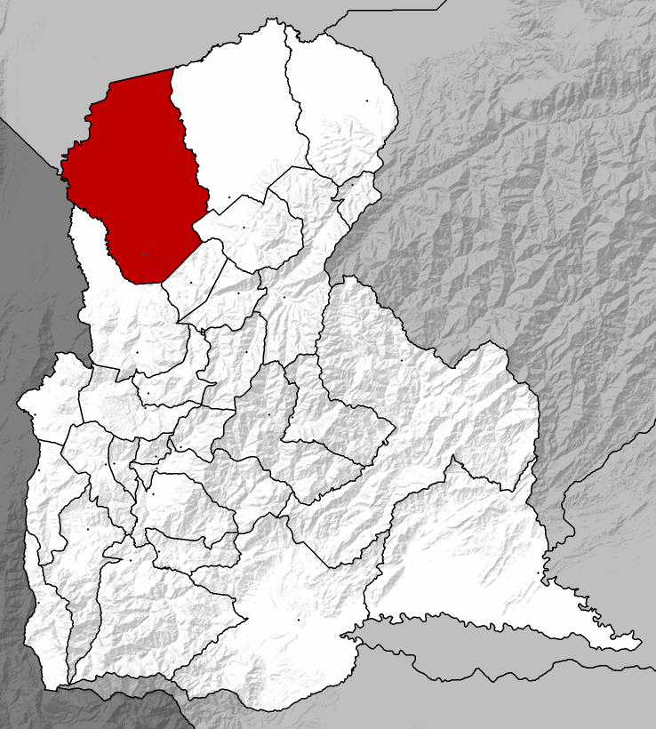 Municipio García de Hevia - Táchira